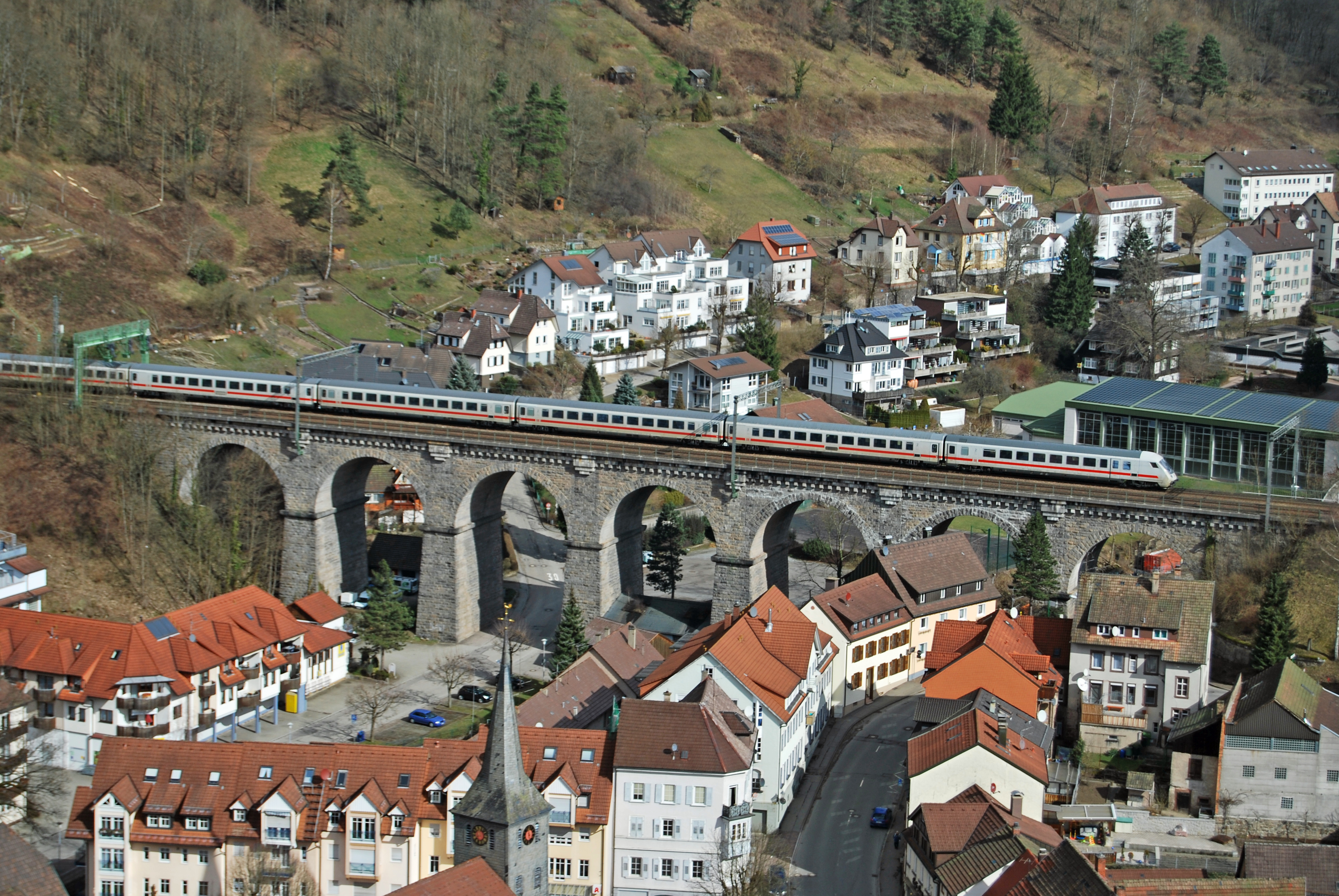 Hornberg